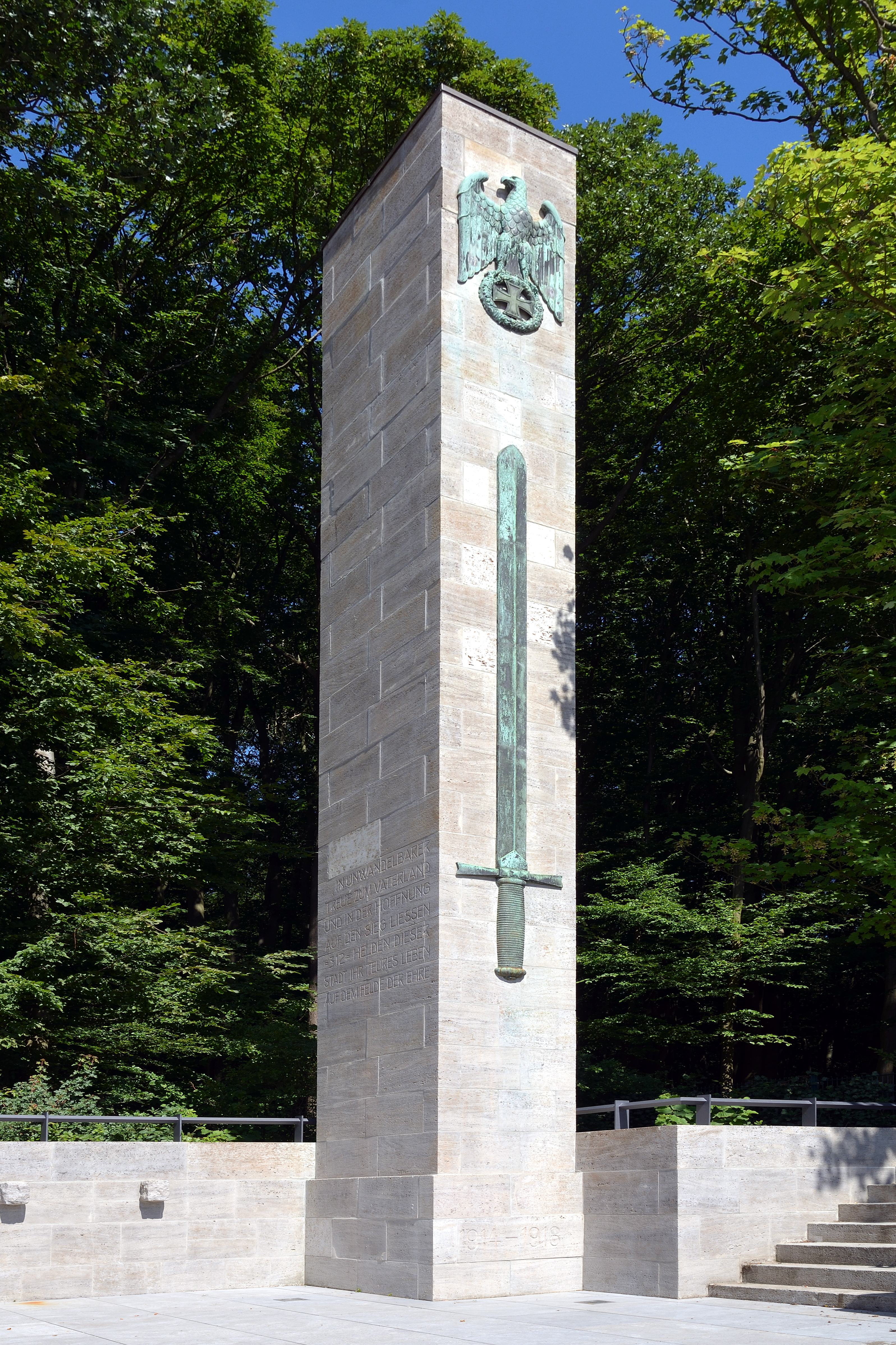 Das Ehrenmal für die Toten des ersten Weltkriegs in Pinneberg am Bahnhof.